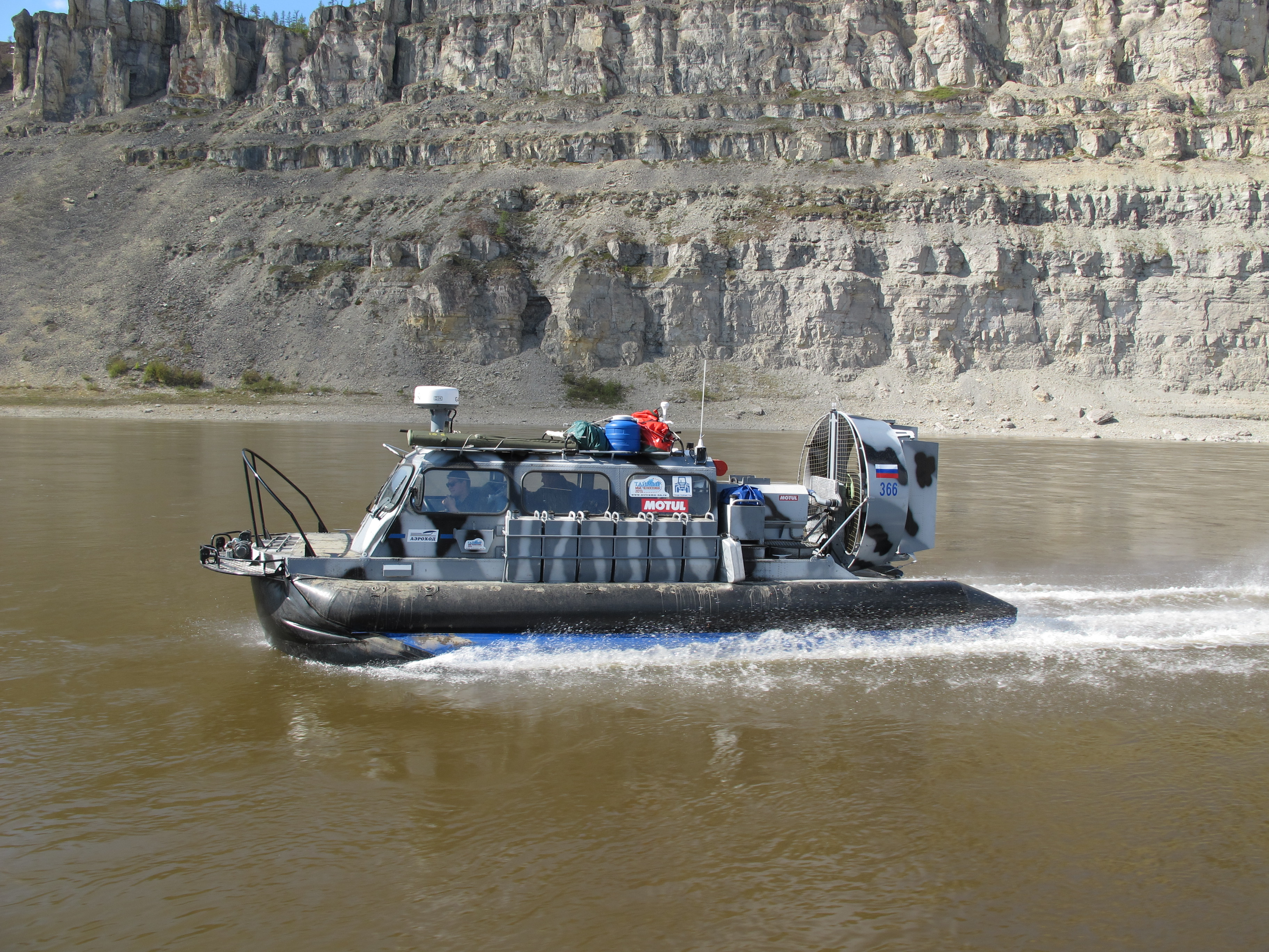 Испытания на реке Котуй